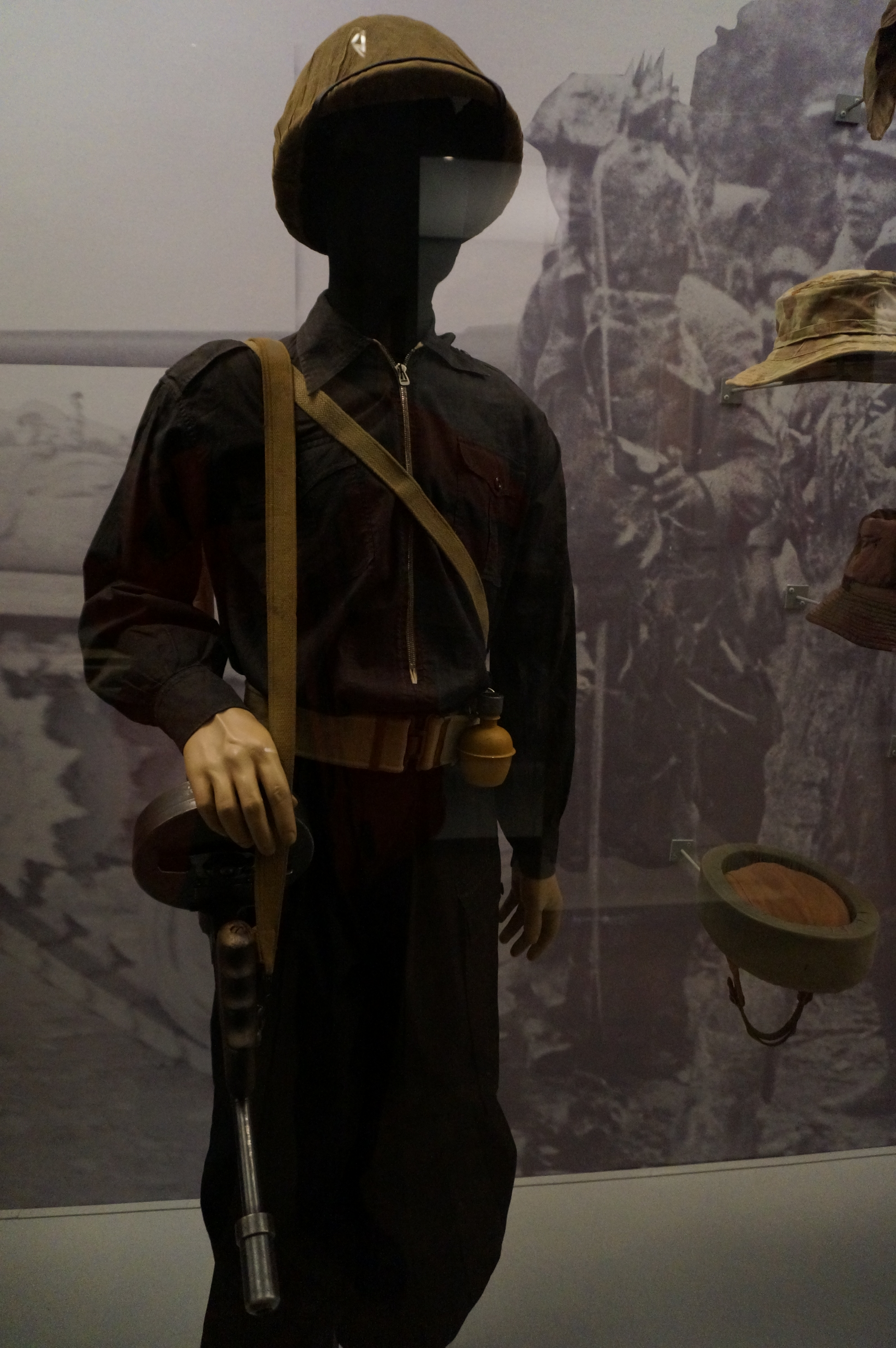 présenté lors de l'exposition Indochine des territoires et des hommes 1856.